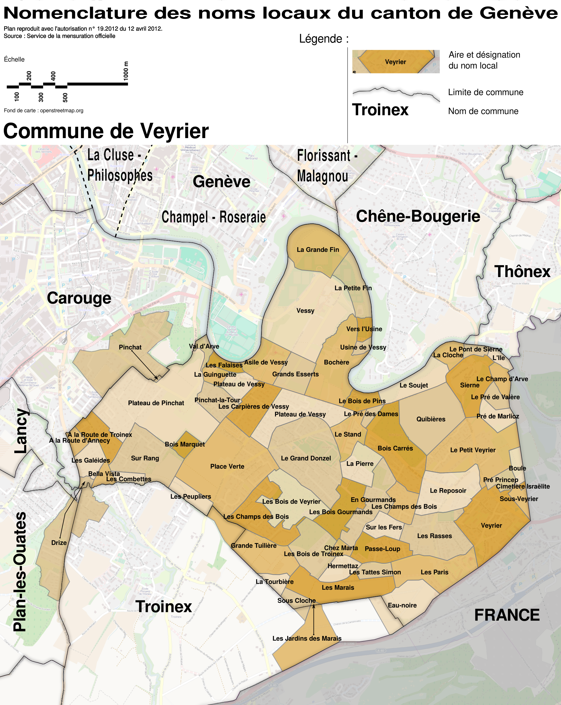 Nomenclature des noms locaux du canton de Genève, généralement appelés "Lieux-dit". Cette nomenclature a été recueillie entre 1932 et 1953 lors de la création du Plan d'Ensemble (PE) du canton de Genève. Plan reproduit avec l'autorisation n° 19.2012 du 12 avril 2012. Source : Service de la mensuration officielle. Noms locaux sur la commune de Veyrier.